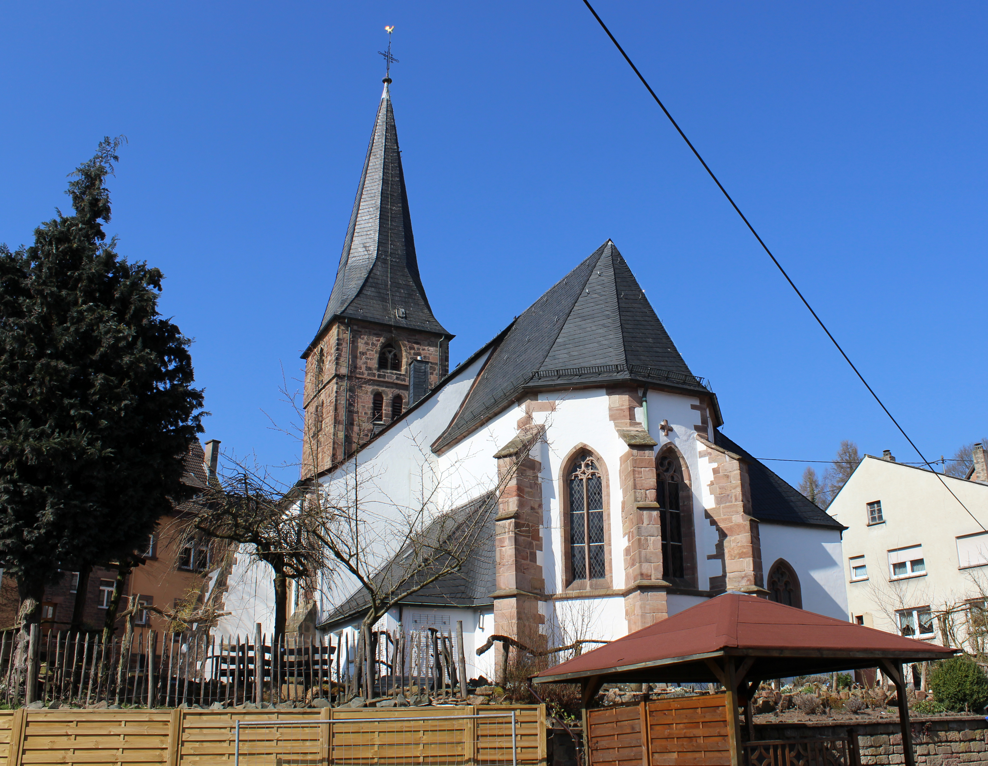 Die evangelische Margarethenkirche in Niederkirchen im Ostertal, einem Stadtteil von St. Wendel, Saarland